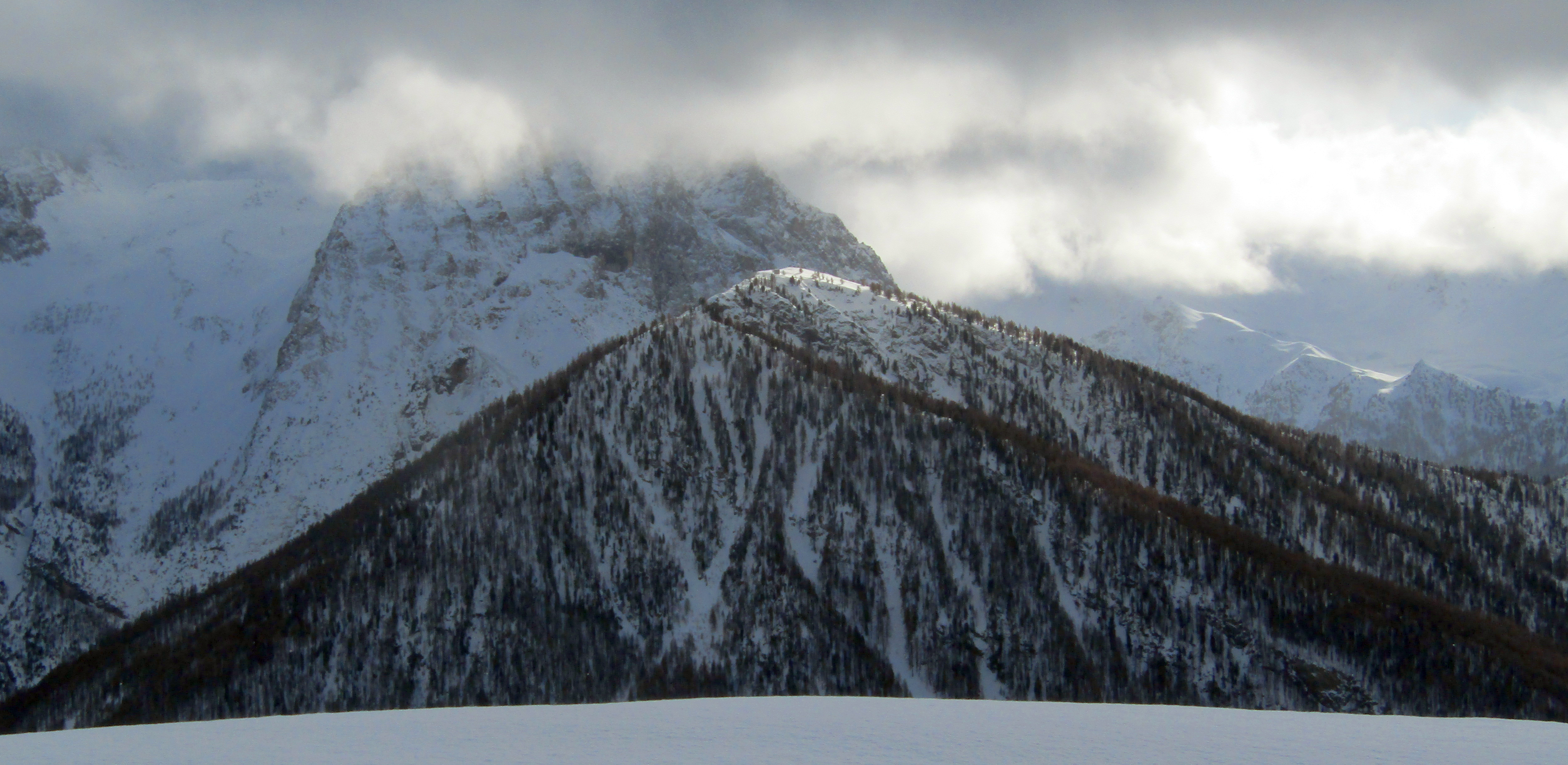 Cima del Bosco vista dalla pista di fondo delle Marmotte (Sestriere)